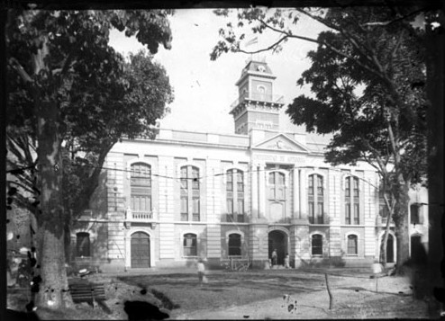 Fachada del Edificio San Ignacio de la Universidad de Antioquia, tomada el 01-01-1928, Medellín, Colombia.